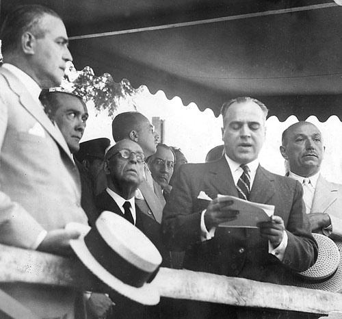 Forografía del gobernador de Tucumán, Miguel Critto escuchando un discurso del intendente de San Miguel de Tucumán, José Lozano Muñoz. Año 1941.